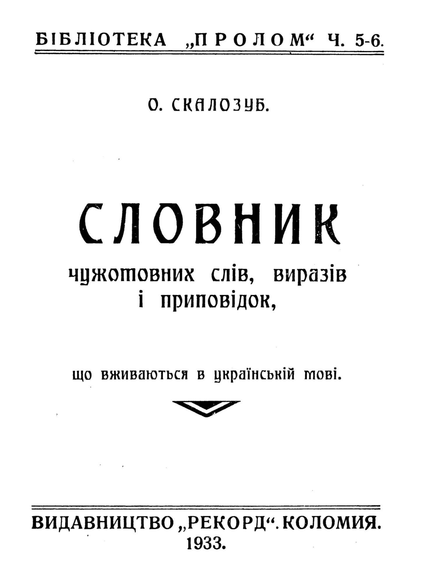 Словник чужомовних слів, виразів і приповідок, що вживаються в українській мові